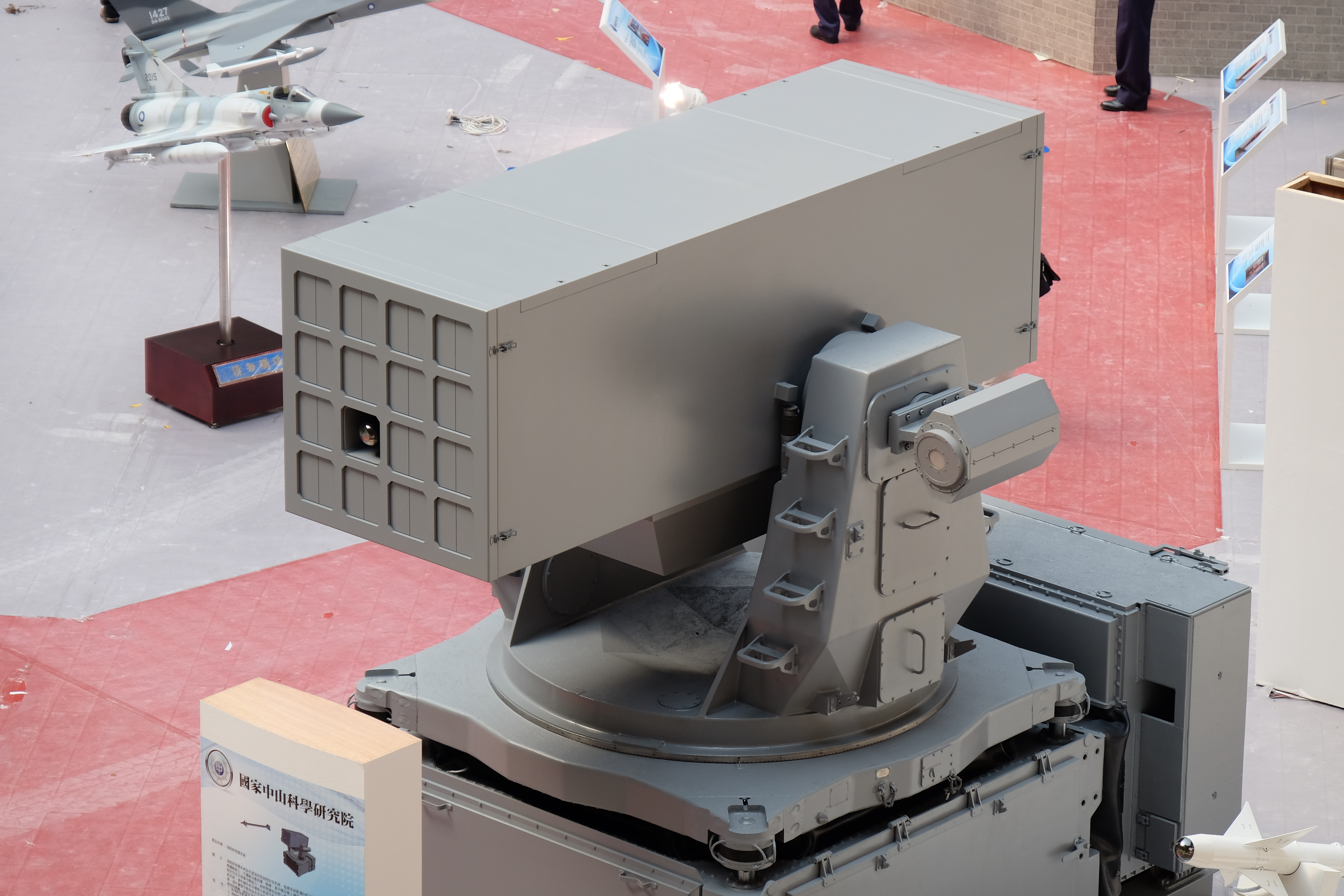 搬入2015台北國際航太暨國防工業展覽會國防館的海劍羚系統上部發射器特寫。